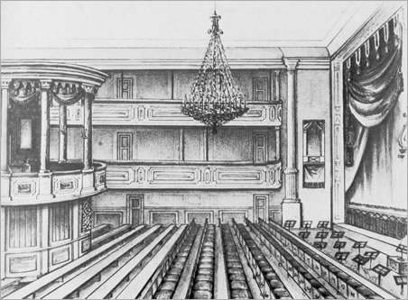 Das Fürstlich Fürstenbergischische Hoftheater (abgebrannt 1850), Innenansicht